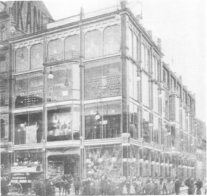 Mannheim, T 1, 1, Warenhaus Sigmund Kander, ca 1902